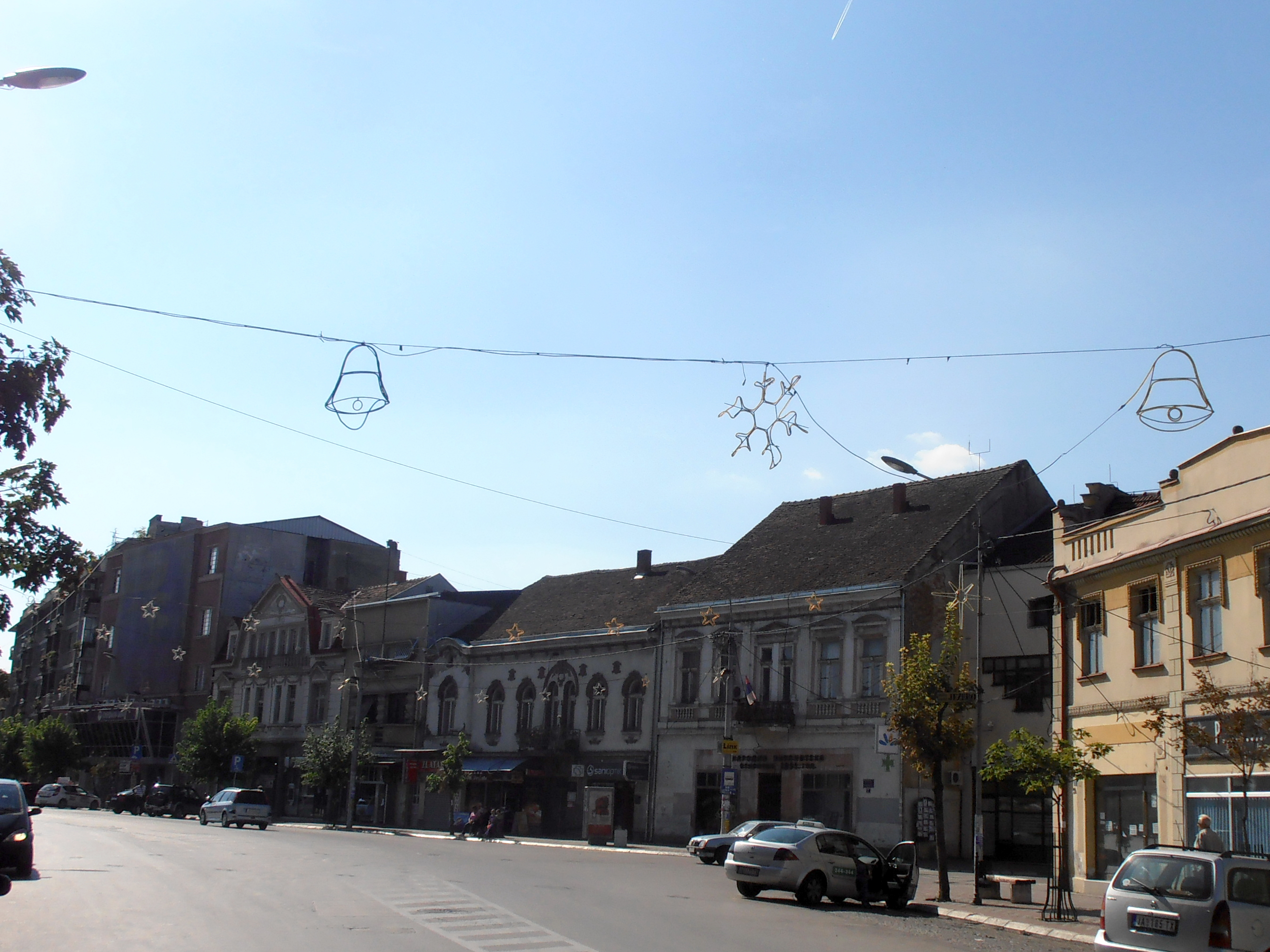 Jagodina, centar grda, Kneginje Milice 2,4,6,8 i 10.